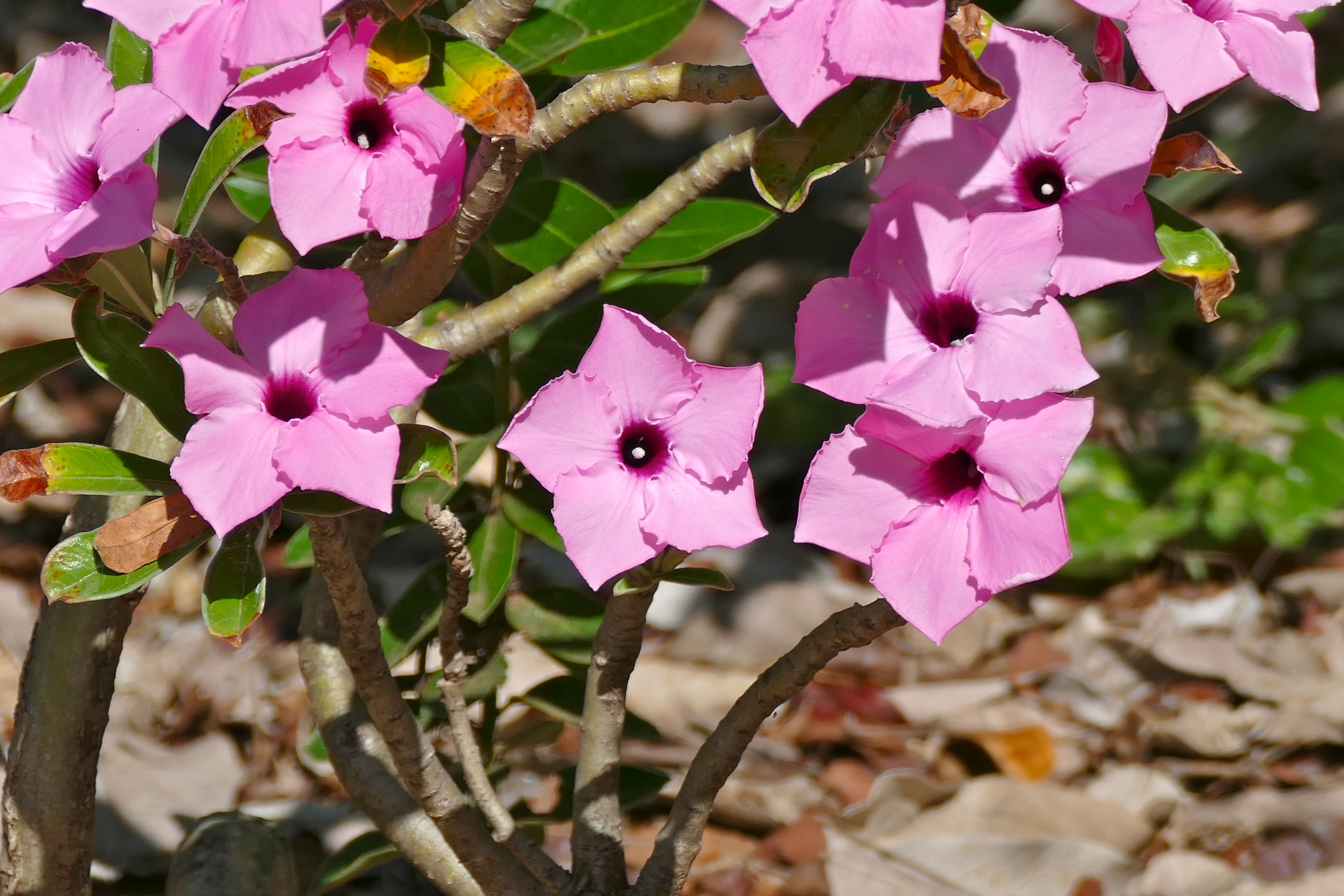 Berg-en-Dal Camp, Kruger NP, SOUTH AFRICA